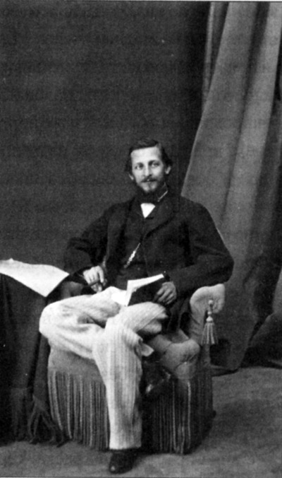 Николай Александрович Кушелев-Безбородко (1834—1862)